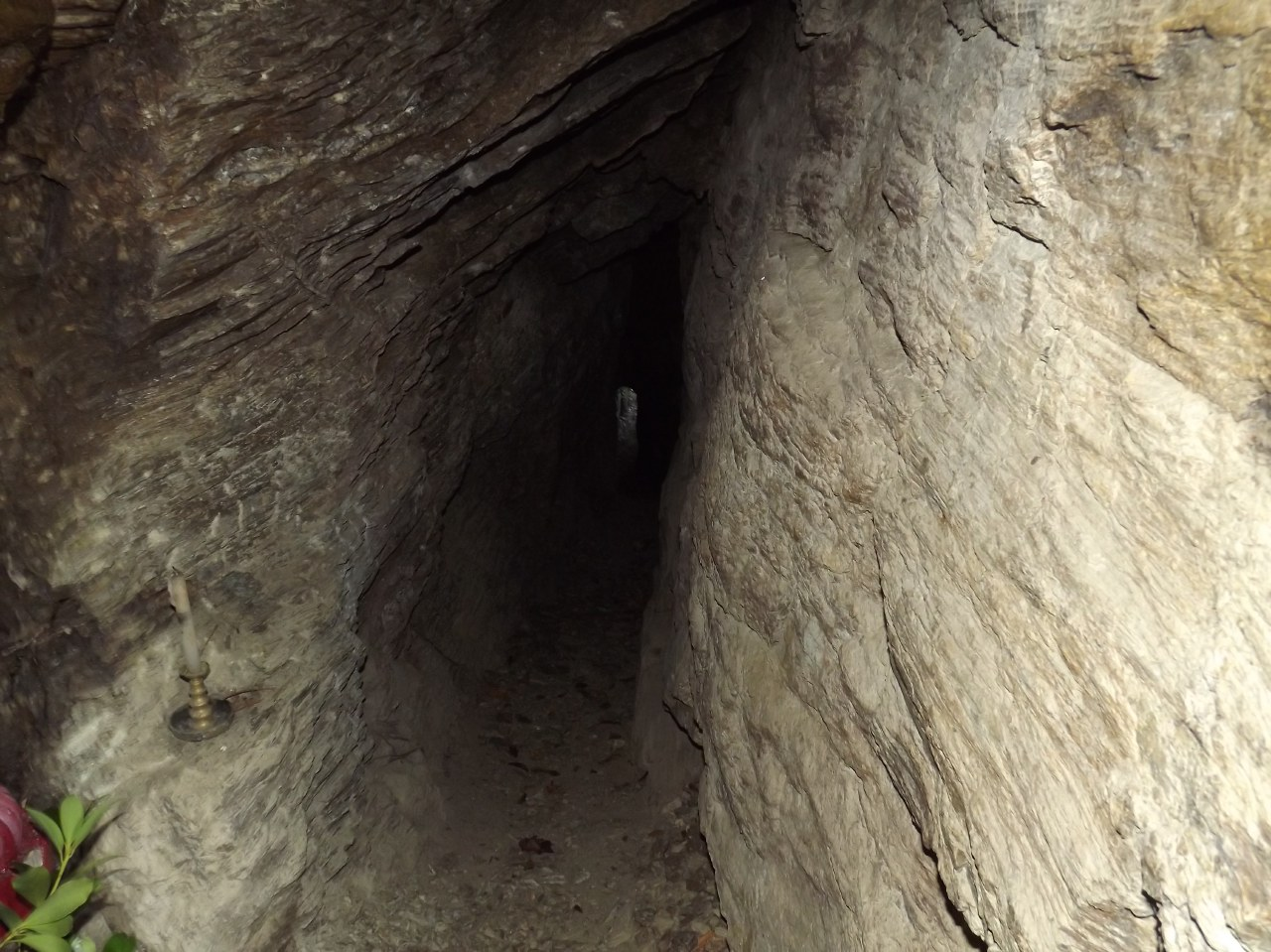 建治寺の洞窟